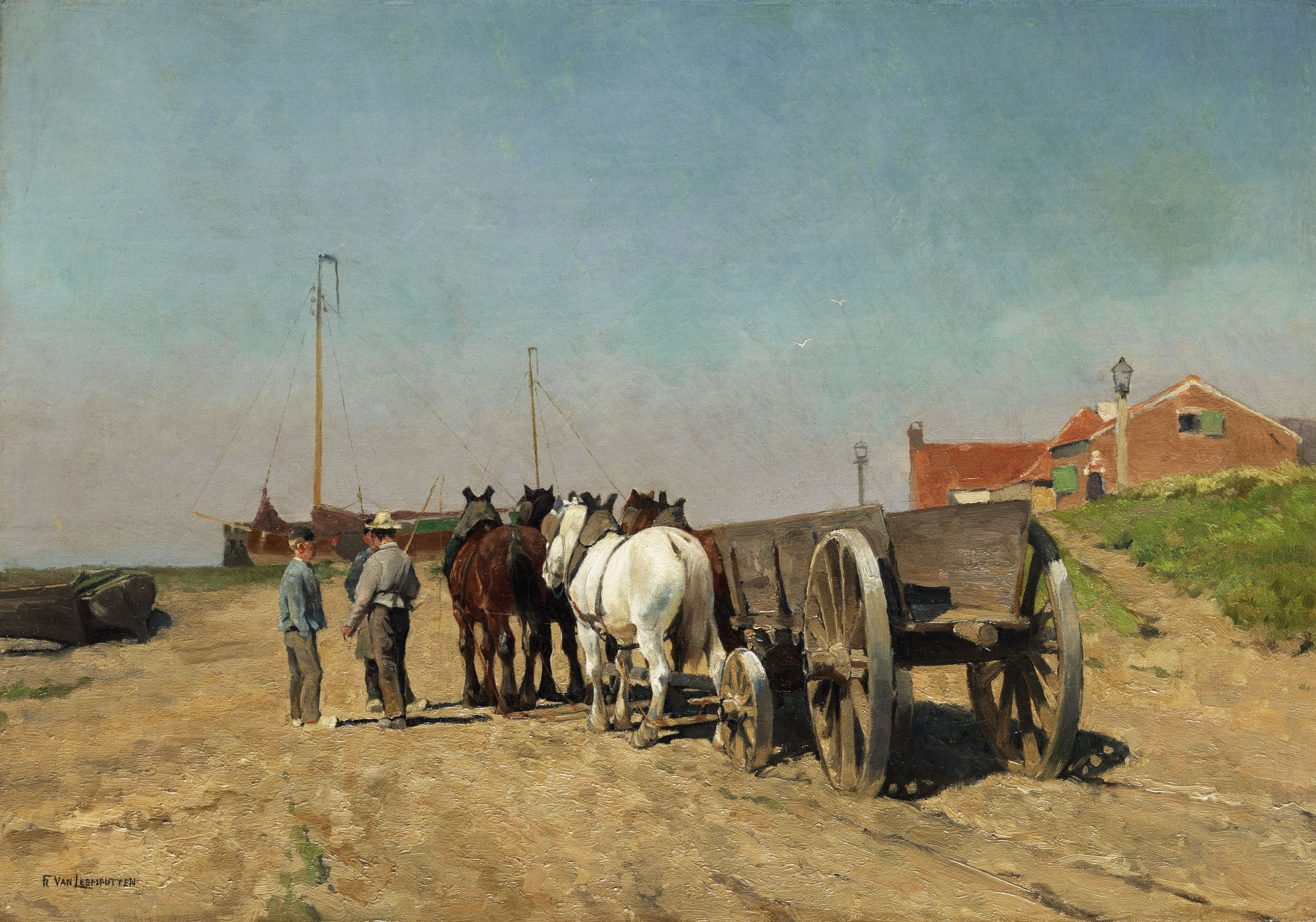 Pferdegespann mit Lastkarren auf einer sandigen Uferstraße. Öl auf Leinwand. 35 x 51 cm. Links unten signiert.